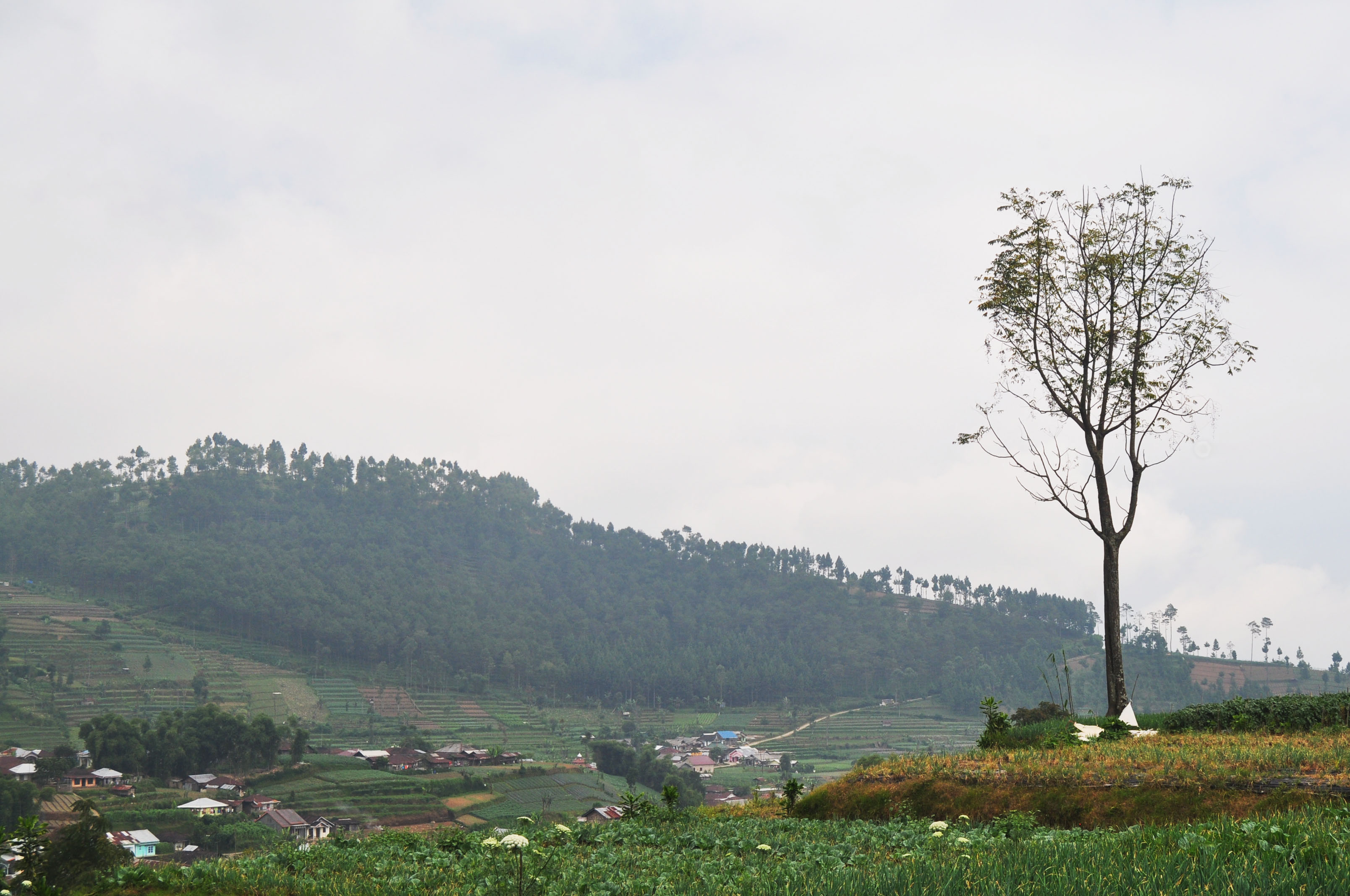 Foto perbukitan, perkebunan, dan pemukiman.